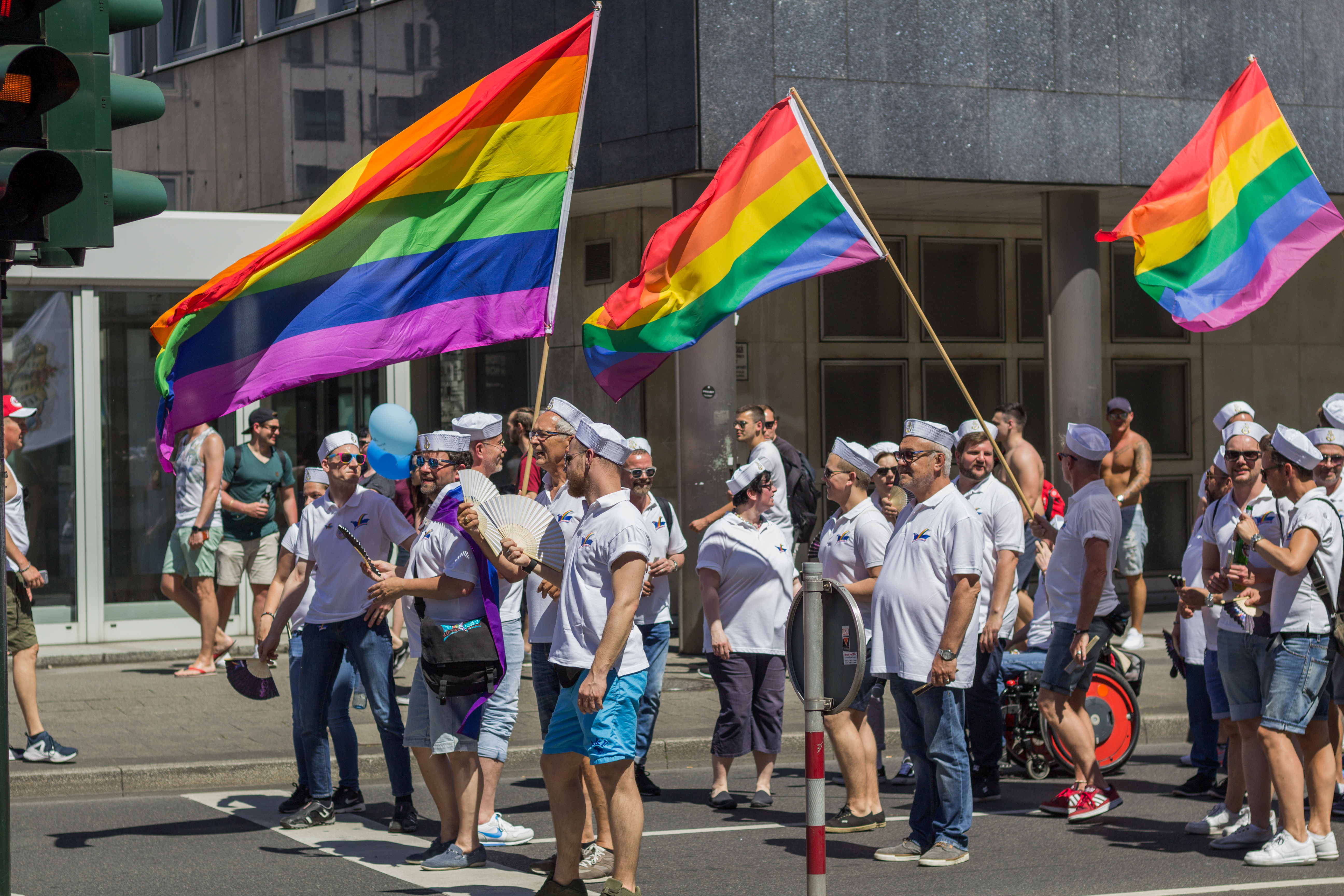 Christopher Street Day 2017 in Düsseldorf